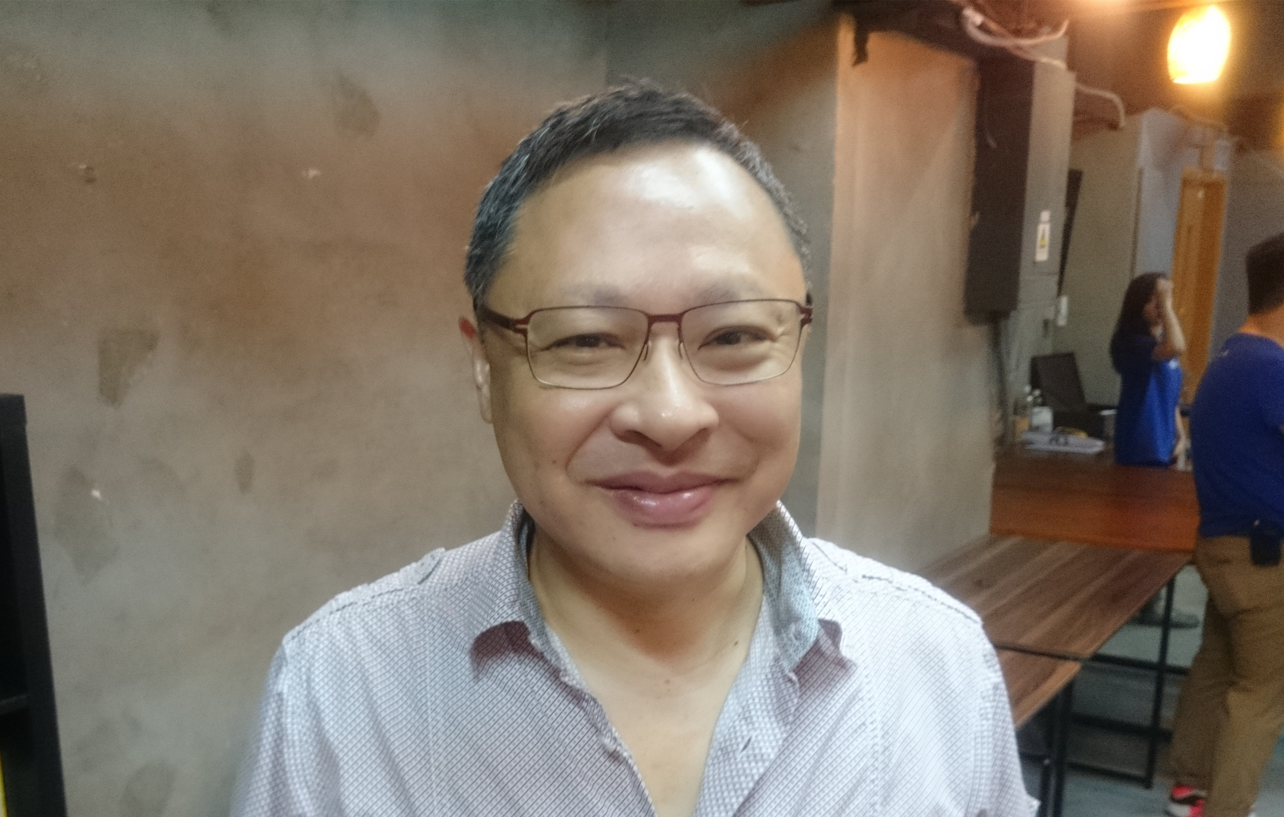 粵語: 2017年8月6號，戴耀廷喺社區網絡聯盟成立典禮度。